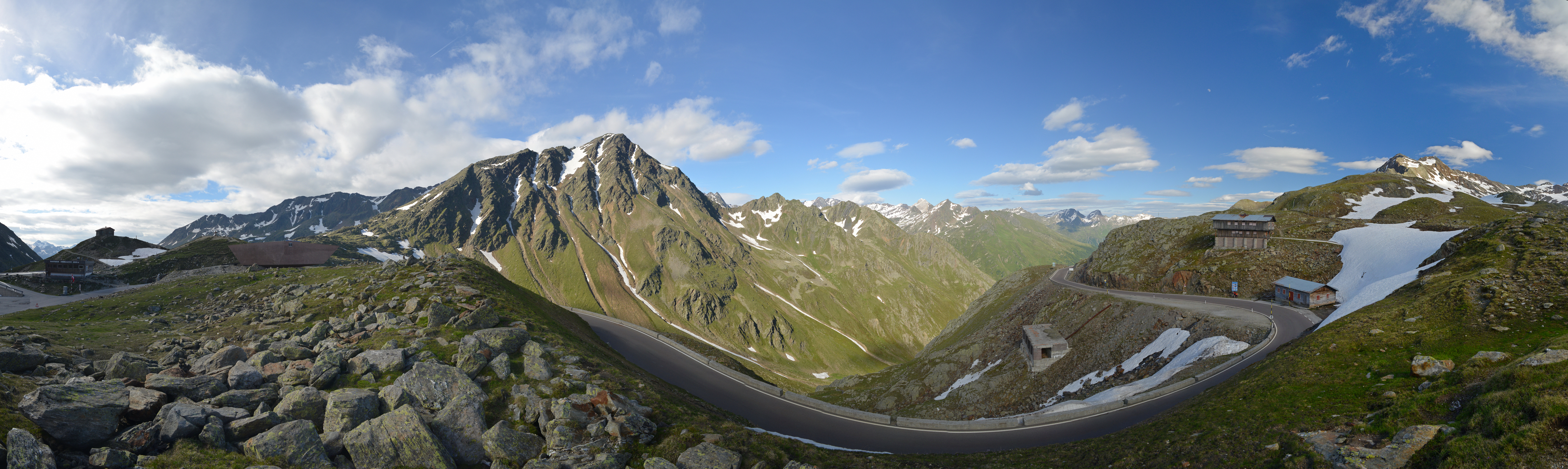 Das Timmelsjoch (Passo del Rombo) ist seit 1919 ein Grenzpass zwischen Österreich (Bundesland Tirol) und Italien (Provinz Südtirol) und liegt auf einer Höhe von Höhe 2.474m.